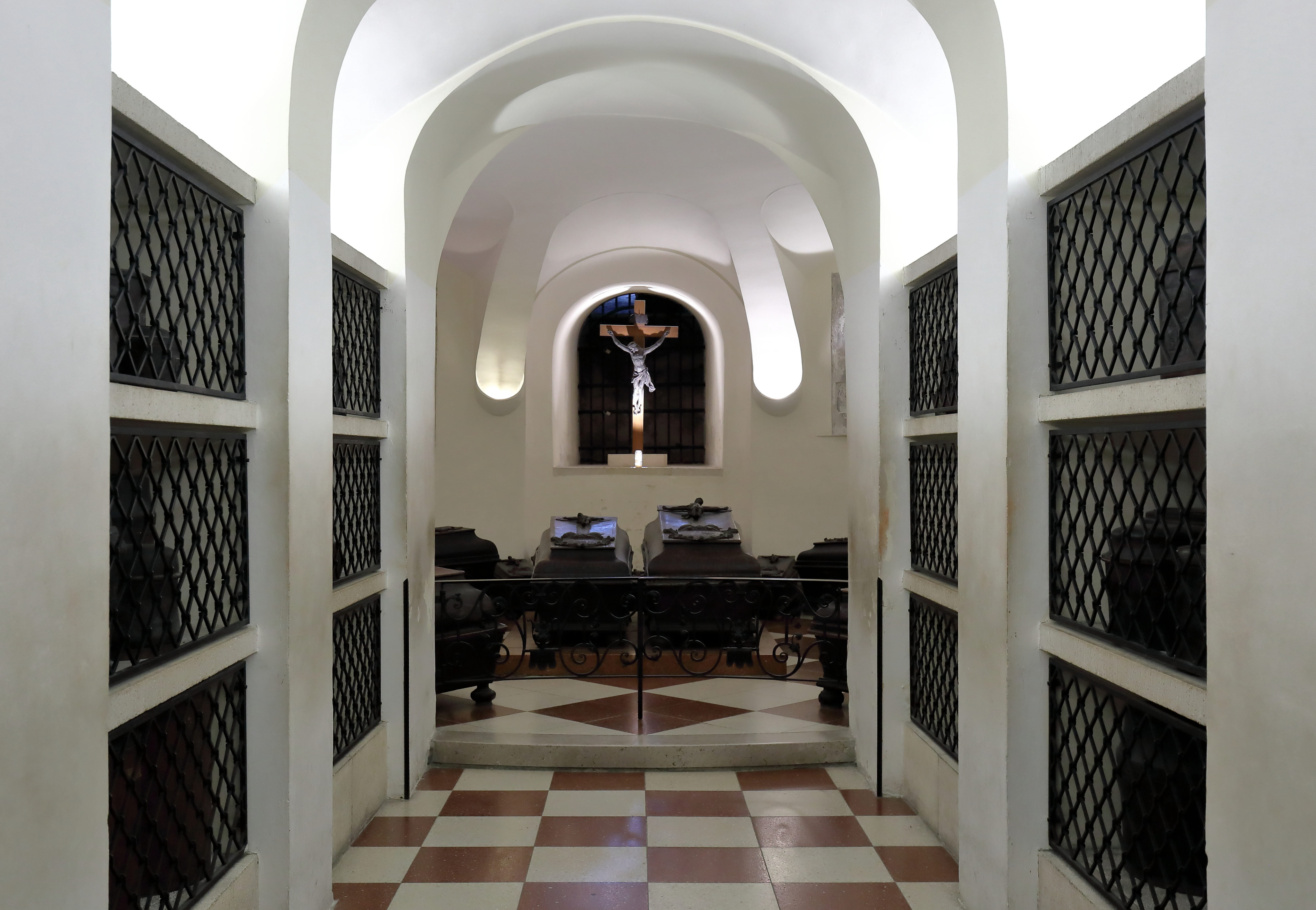 Die Herzogsgruft unter dem Mittelchor des Stephansdoms in der österreichischen Bundeshauptstadt Wien. In ihr sind der Stifter des Stephansdoms, Herzog Rudolf IV., seine Gattin und über 10 weitere Familienmitglieder beigesetzt. Im Vordergrund die Nischen, in denen die Eingeweide-Urnen von über 70 Habsburgern aufbewahrt werden.